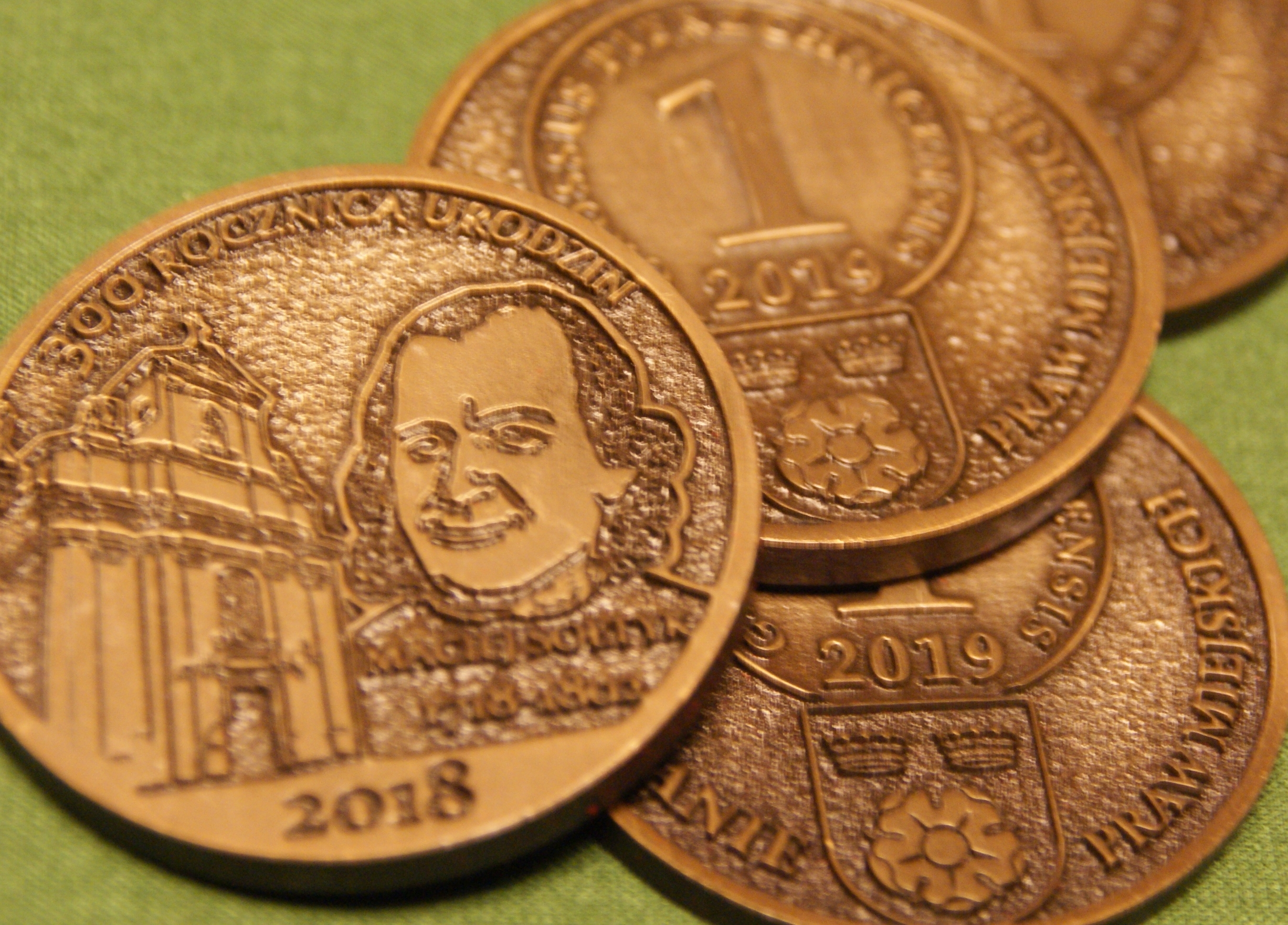 Awers przedstawia wizerunek Macieja Sołtyka oraz ścianę frontową kościoła pw. św. Małgorzaty w Pierzchnicy. na rewersie umieszczono herb Pierzchnicy, symboliczny 1 grosz pierzchnicki z rokiem 2019 oraz napis ODZYSKANIE PRAW MIEJSKICH